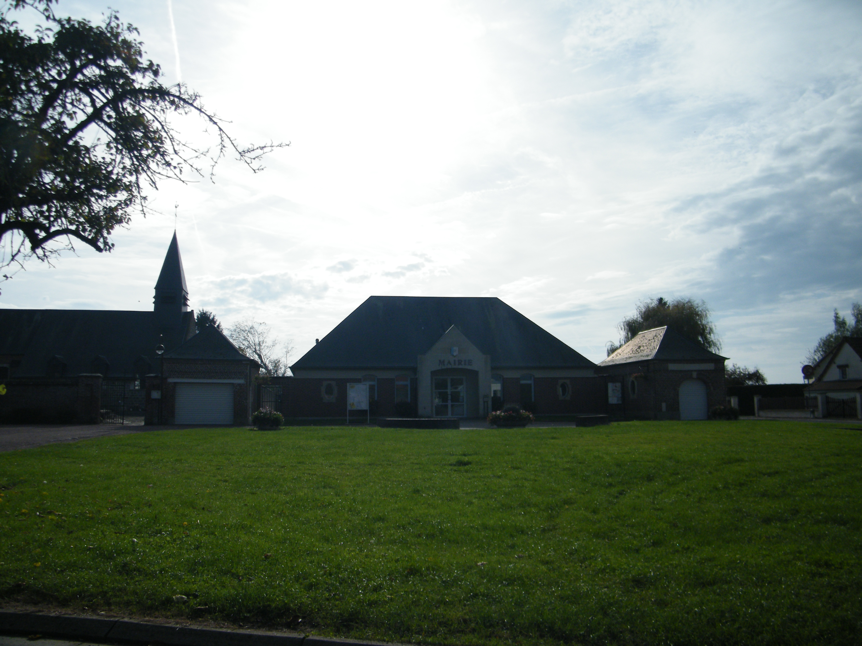 Mairie.